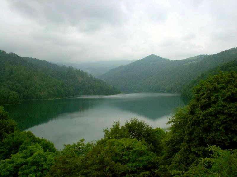 Озеро Гейгел